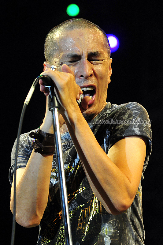 Amy Search di Konsert Search - Di Awan Biru (2009)